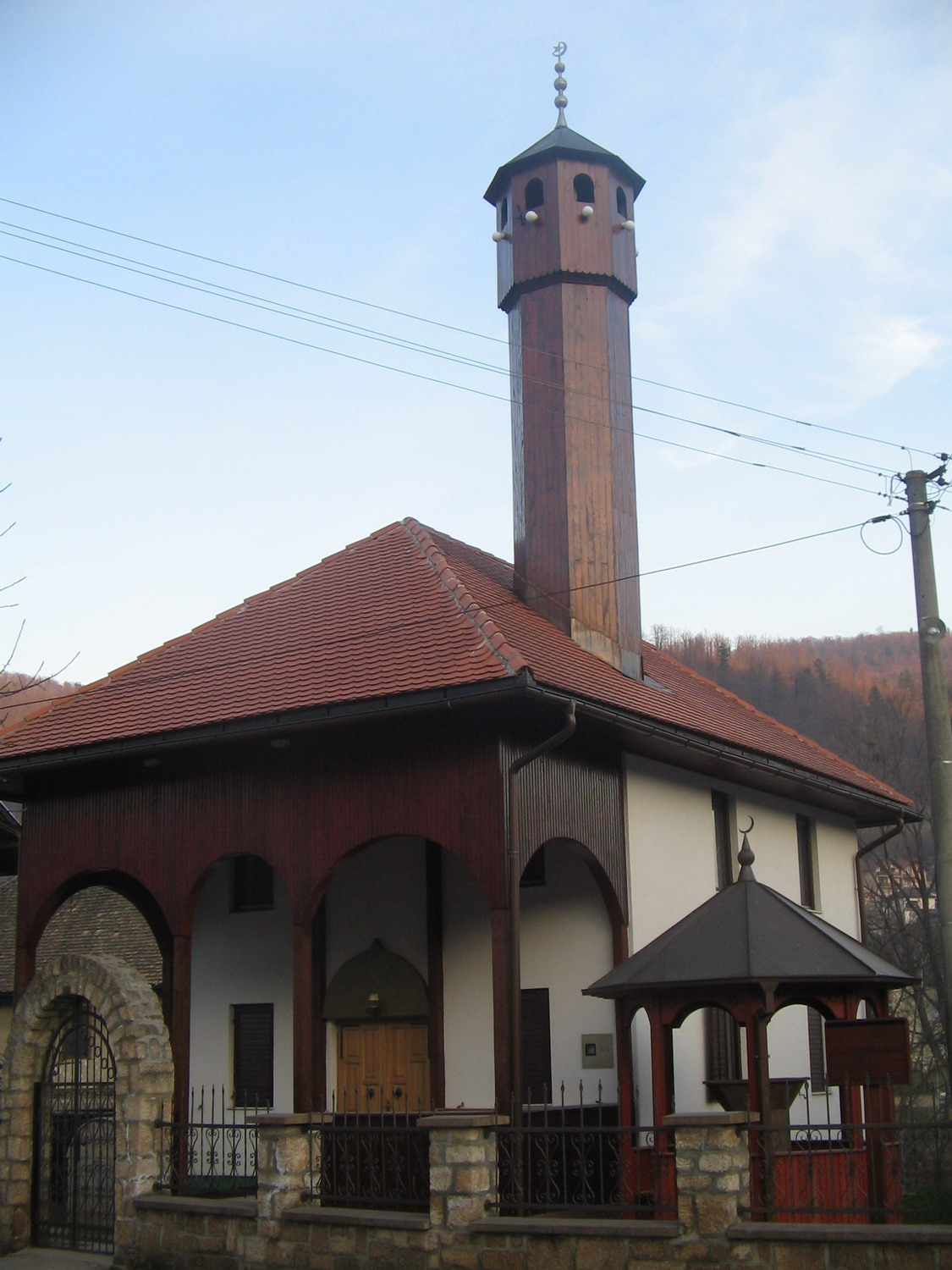 Хаџи Зулфикар џамија (Новоселија, Бања Лука)